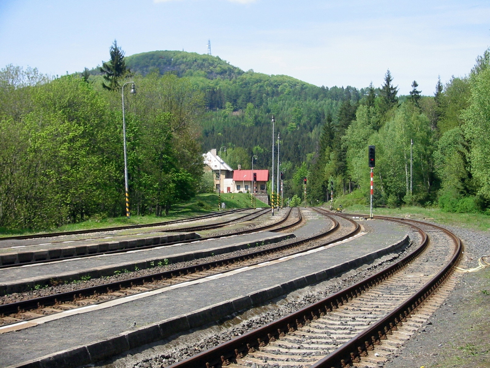 Železniční stanice Jedlová se stejnojmennou horou (774 m) v pozadí